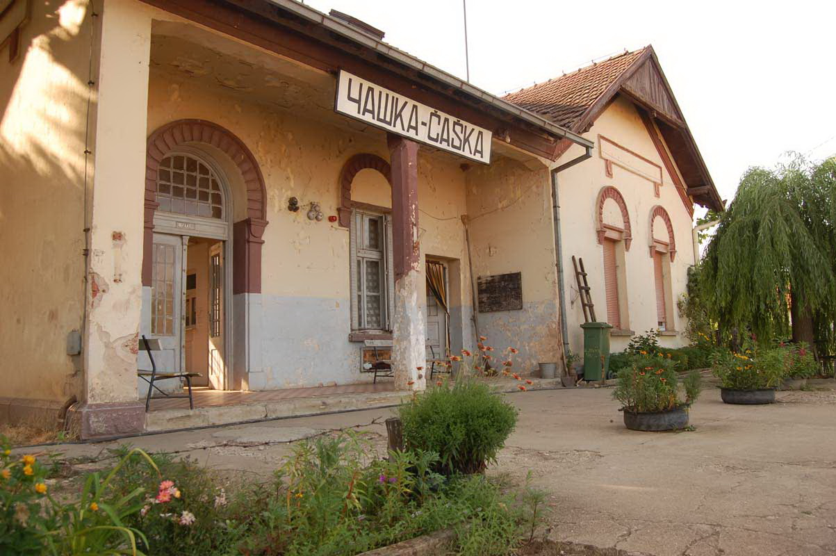 Железничка станица с. Чашка - Велес